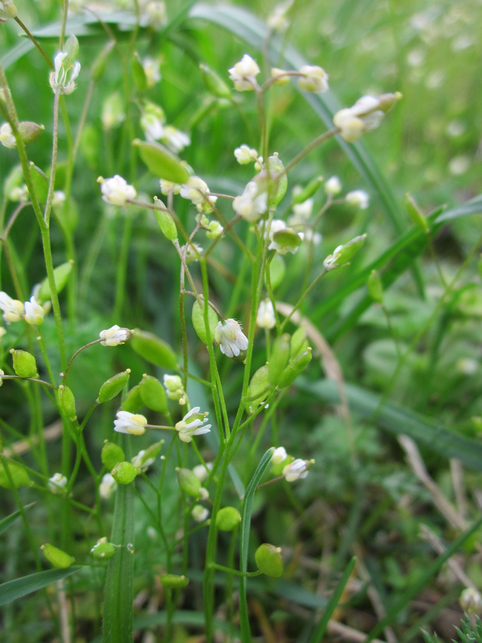 Frühlings-Hungerblümchen (Draba verna) im Bürgerpark Saarbrücken